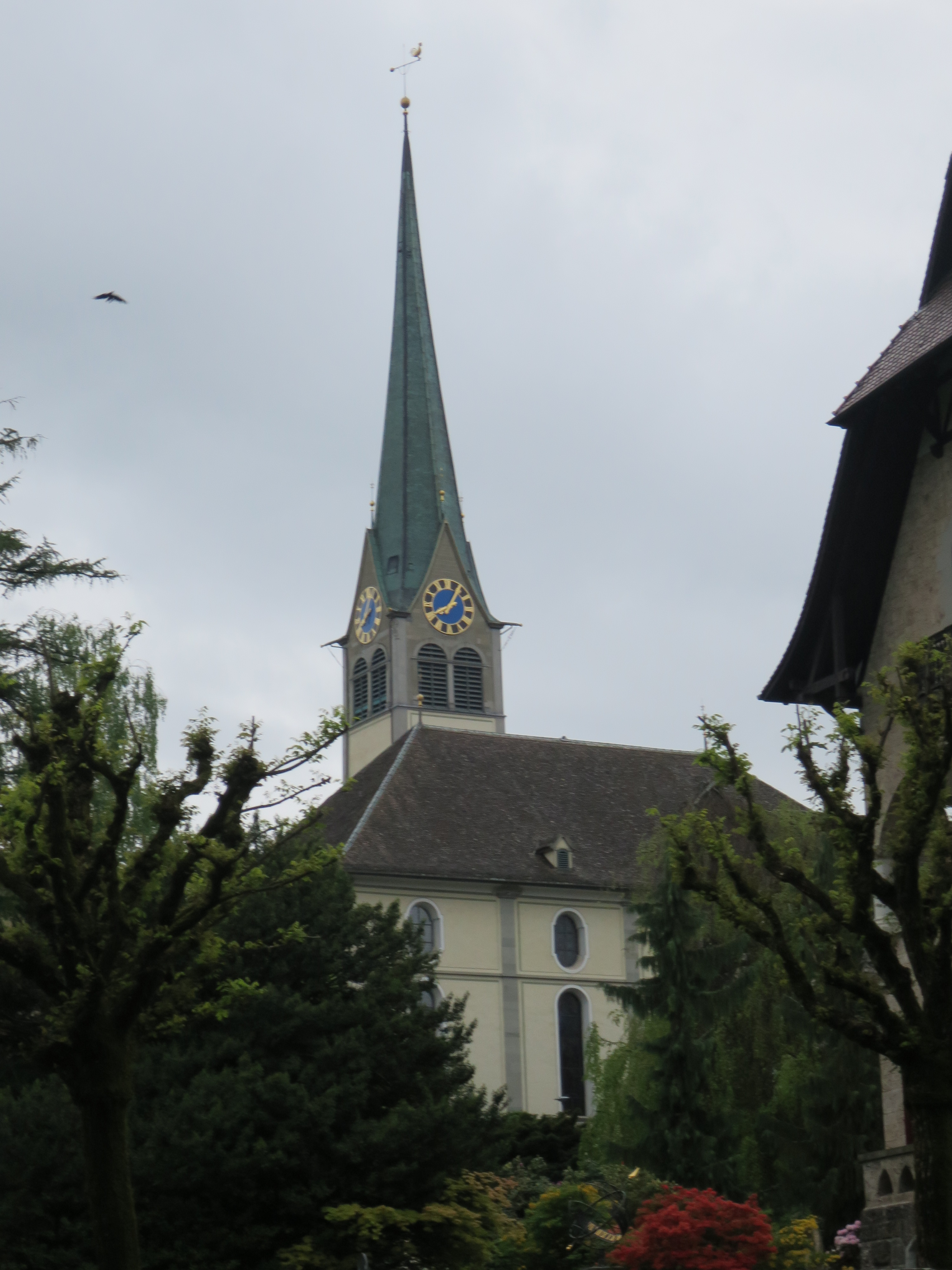 Reformierte Kirche Wädenswil - Ansicht von Osten